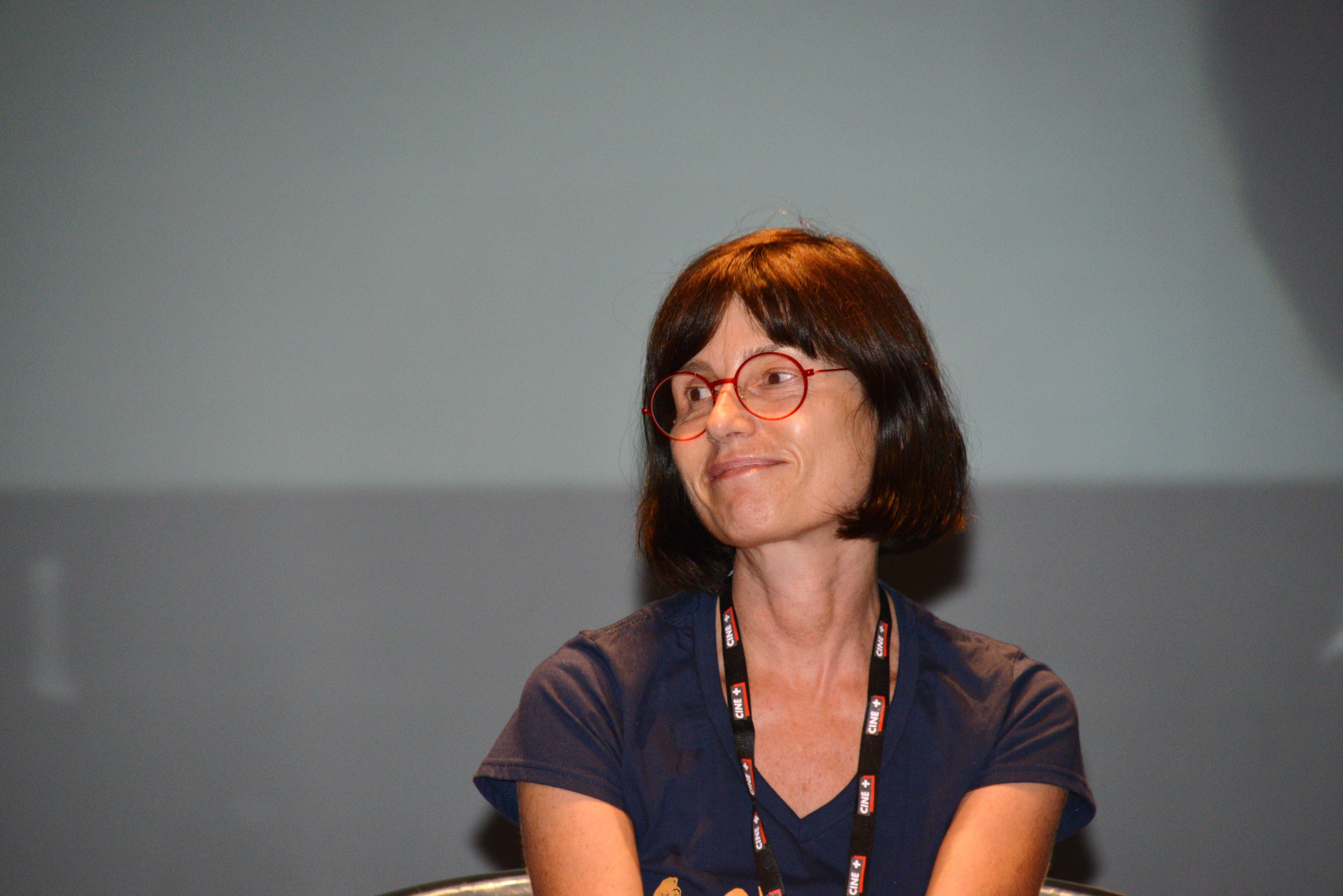 La cinéaste turque Yeşim Ustaoğlu au Festival International du Film de La Rochelle 2016: Rencontre avec la réalisatrice turque Yeşim Ustaoğlu et le directeur du Festival du Film d’Istanbul Kerem Ayam animée par Ariel Schweitzer, Théatre Verdière, La Coursive, mardi 5 juillet 2016 à 16h15. La Rochelle, Charente-Maritime, France.